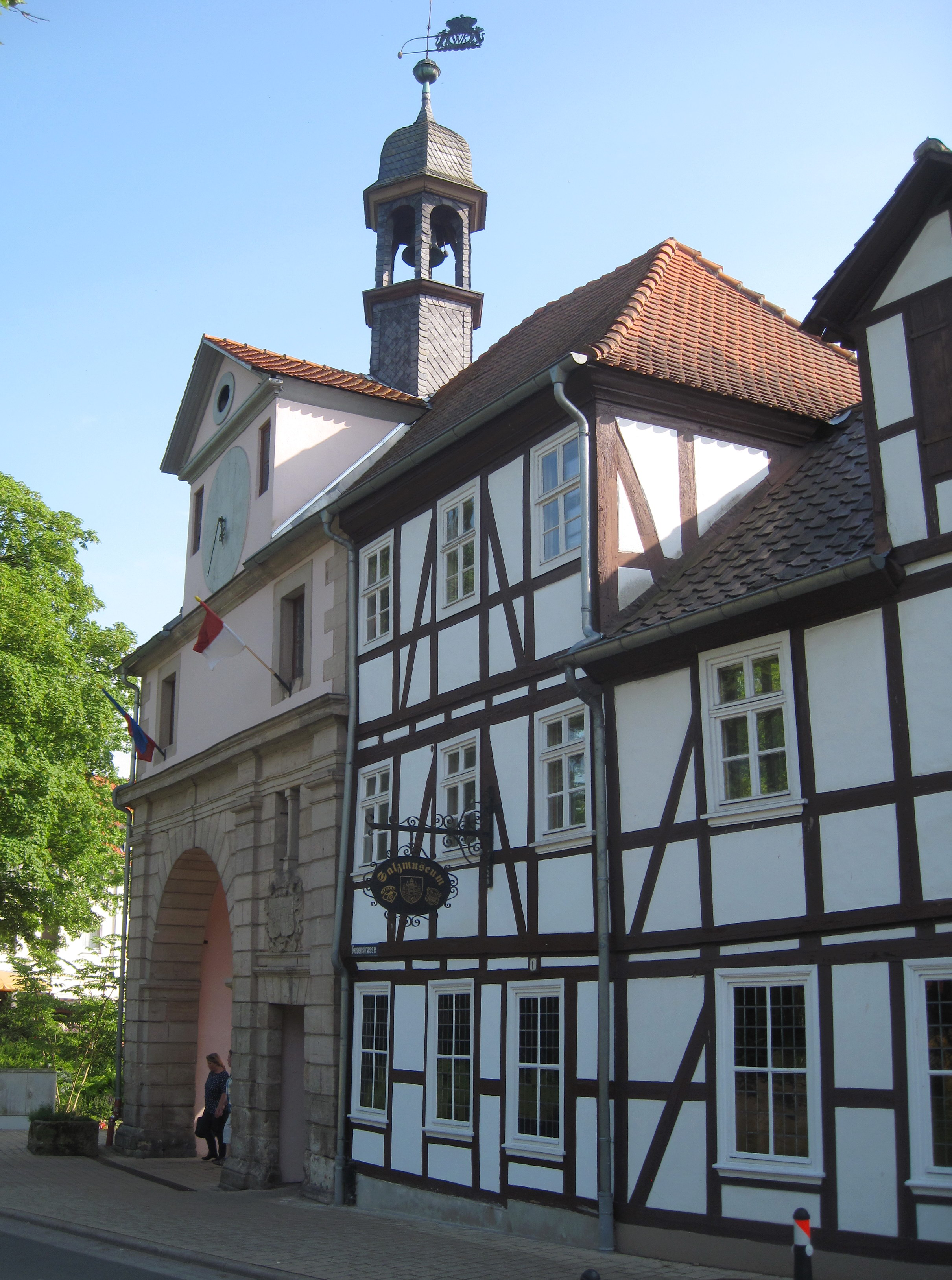 Salzmuseum in Bad Sooden-Allendorf, Ortsteil Bad Sooden.